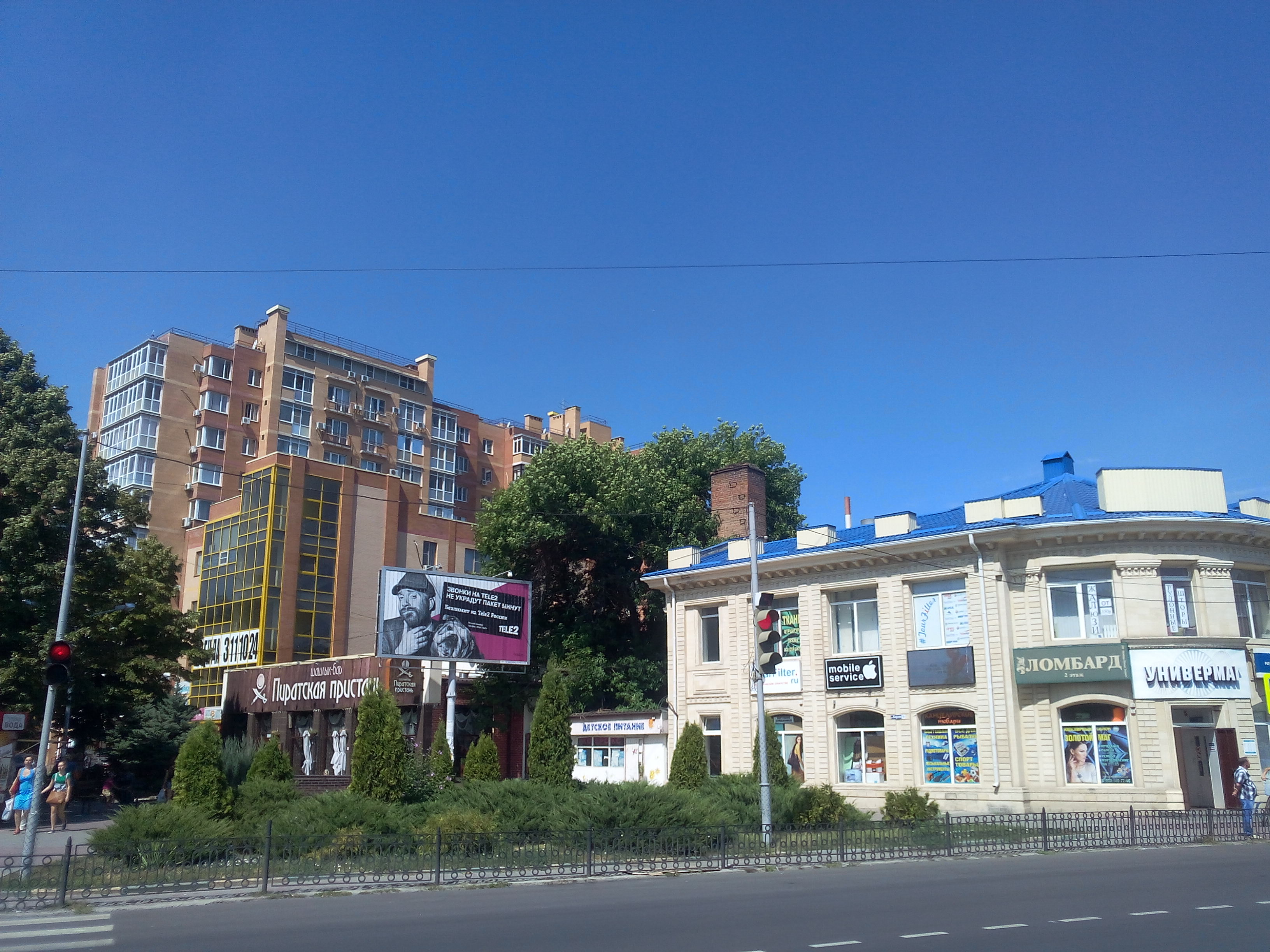 г. Батайск, центр, перекресток улиц Кирова и Энгельса